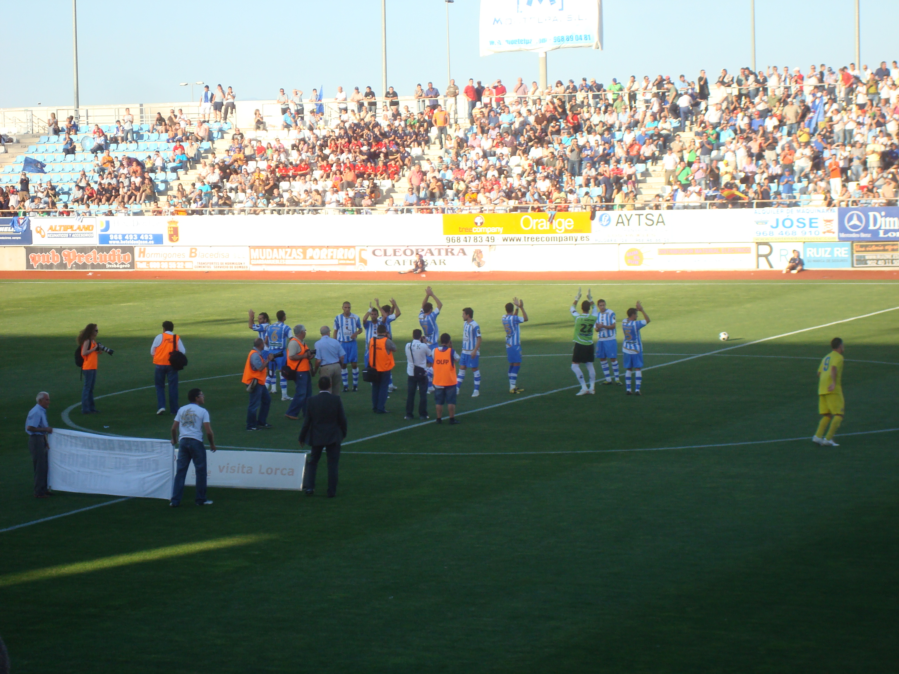 Salida al campo del Lorca en el Lorca Villarreal B